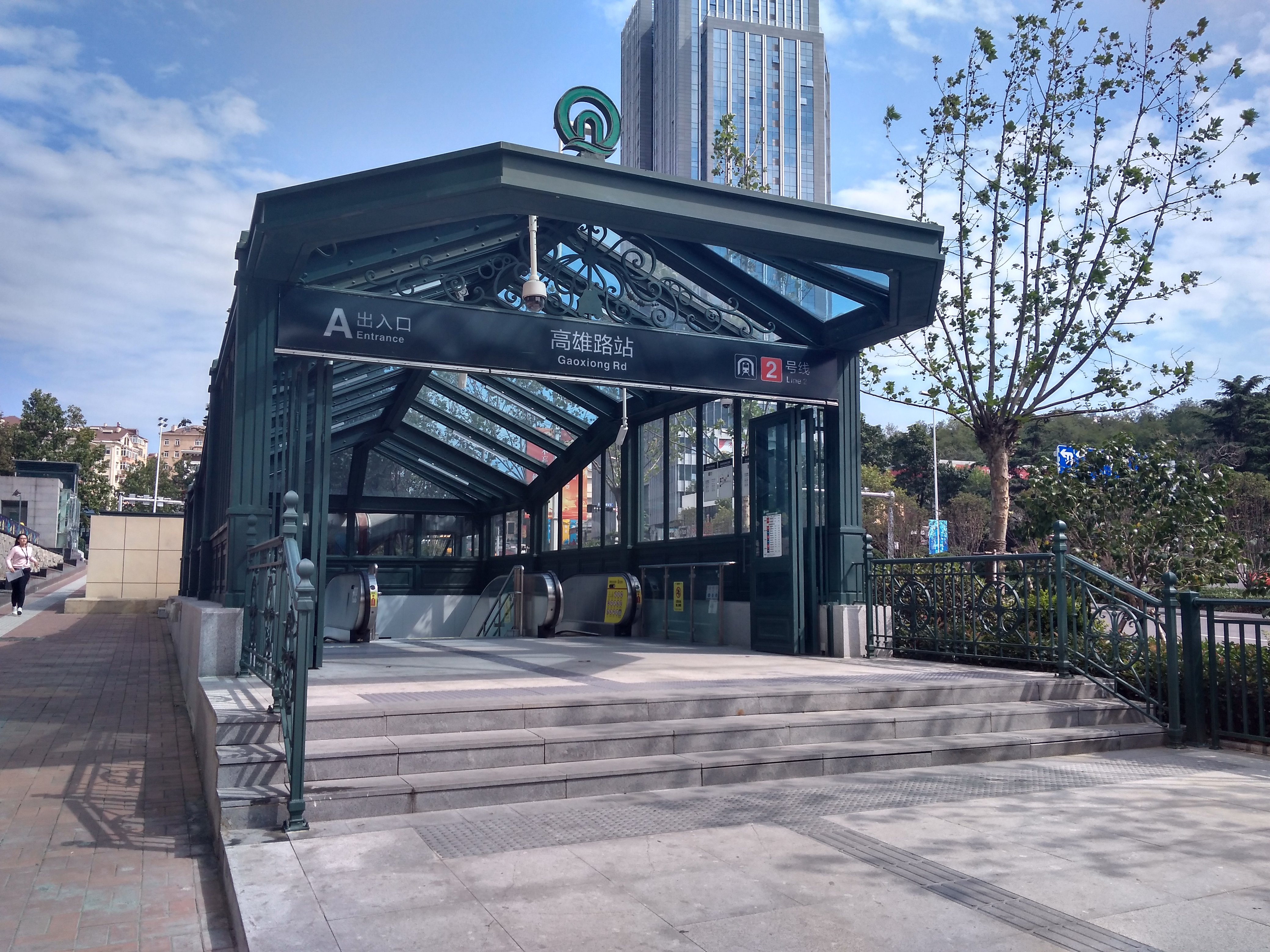 高雄路站A口